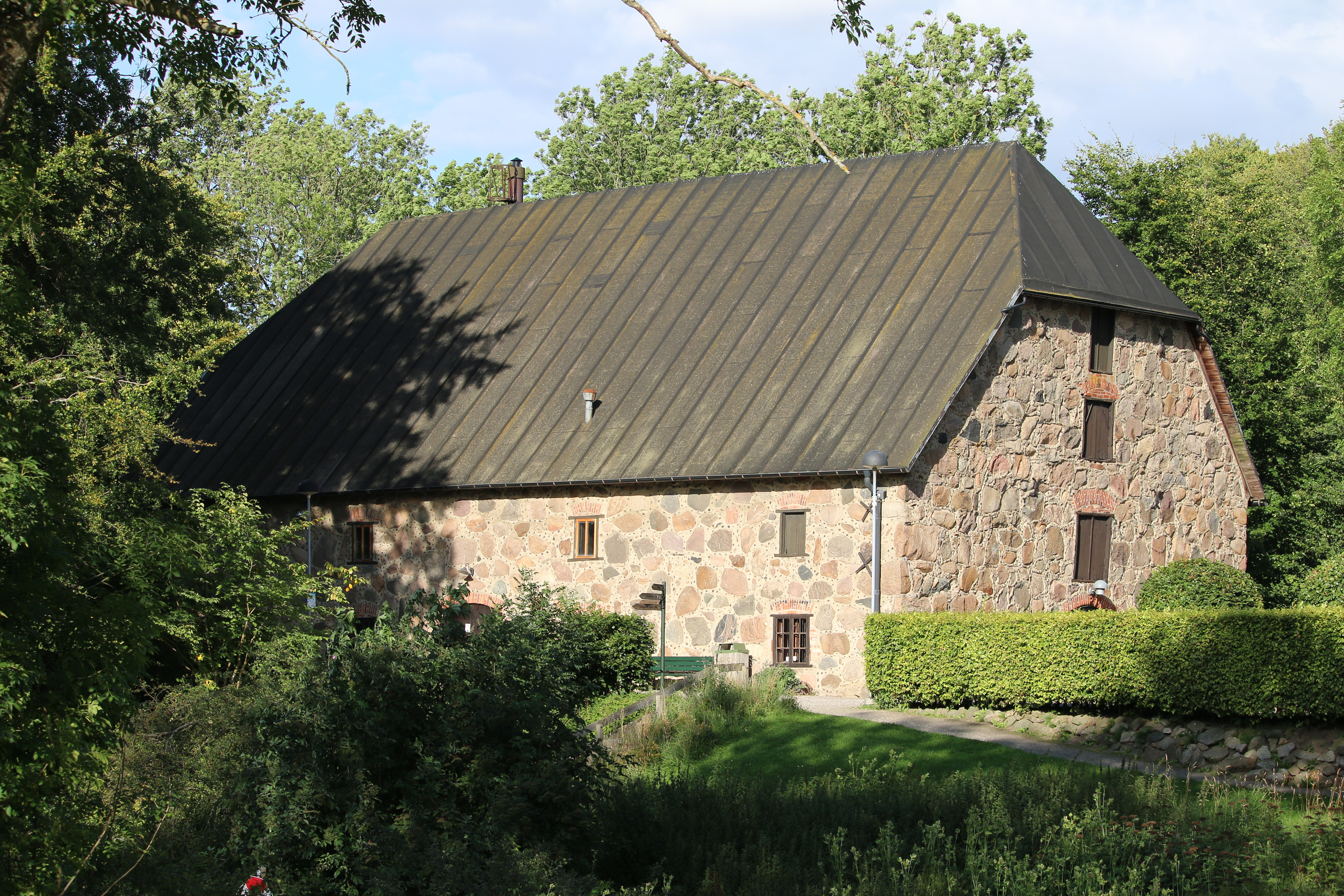 Magasinet vid Torups slott. Innehåller omklädningslokaler till rekreationsområdet.